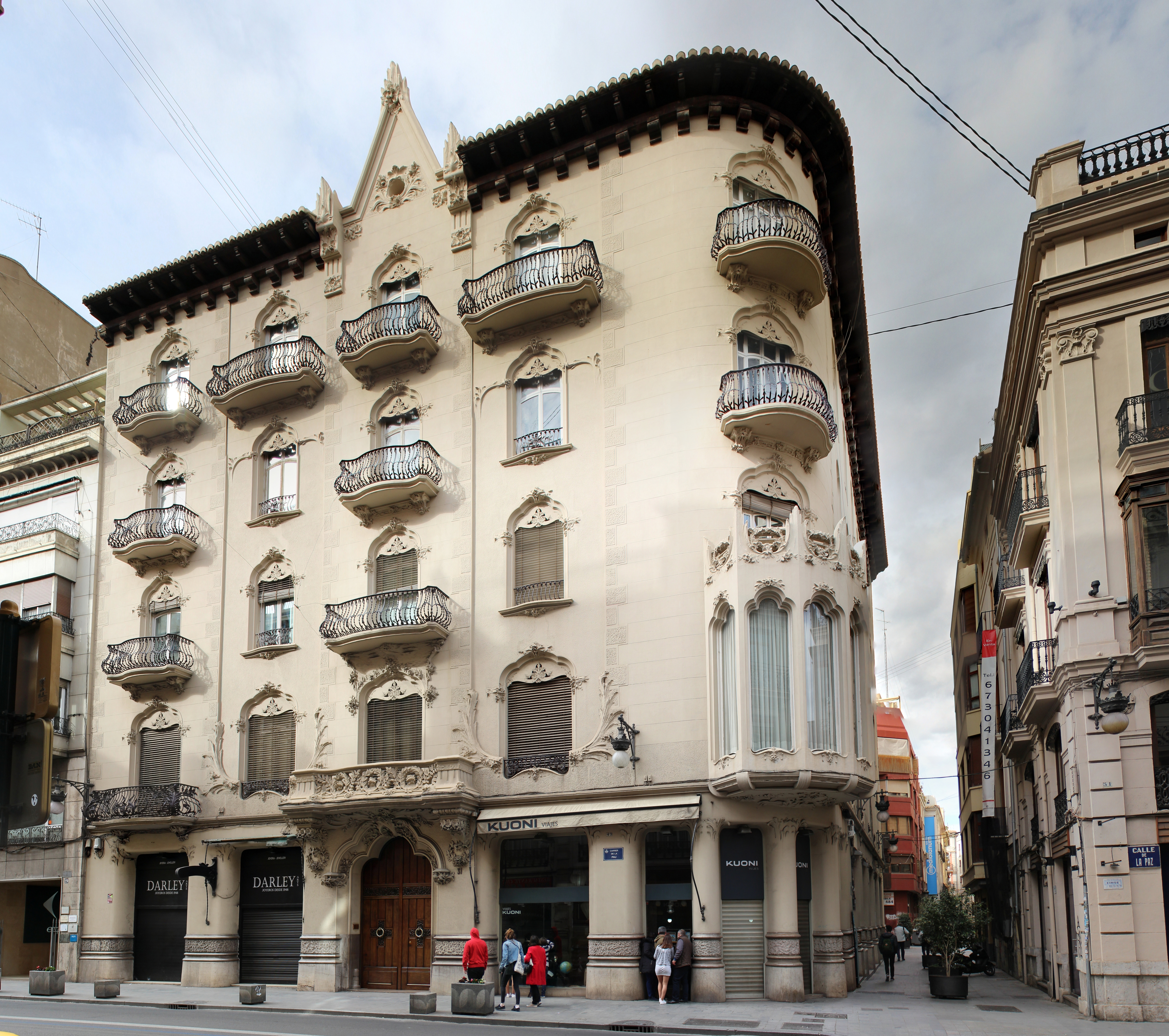 Edificio Gómez I de Francisco Mora Berenguer en la calle de la Paz número 31 esquina con la calle Bonaire de Valencia